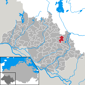 Wöbbelin in Mecklenburg-Vorpommern - district Ludwigslust